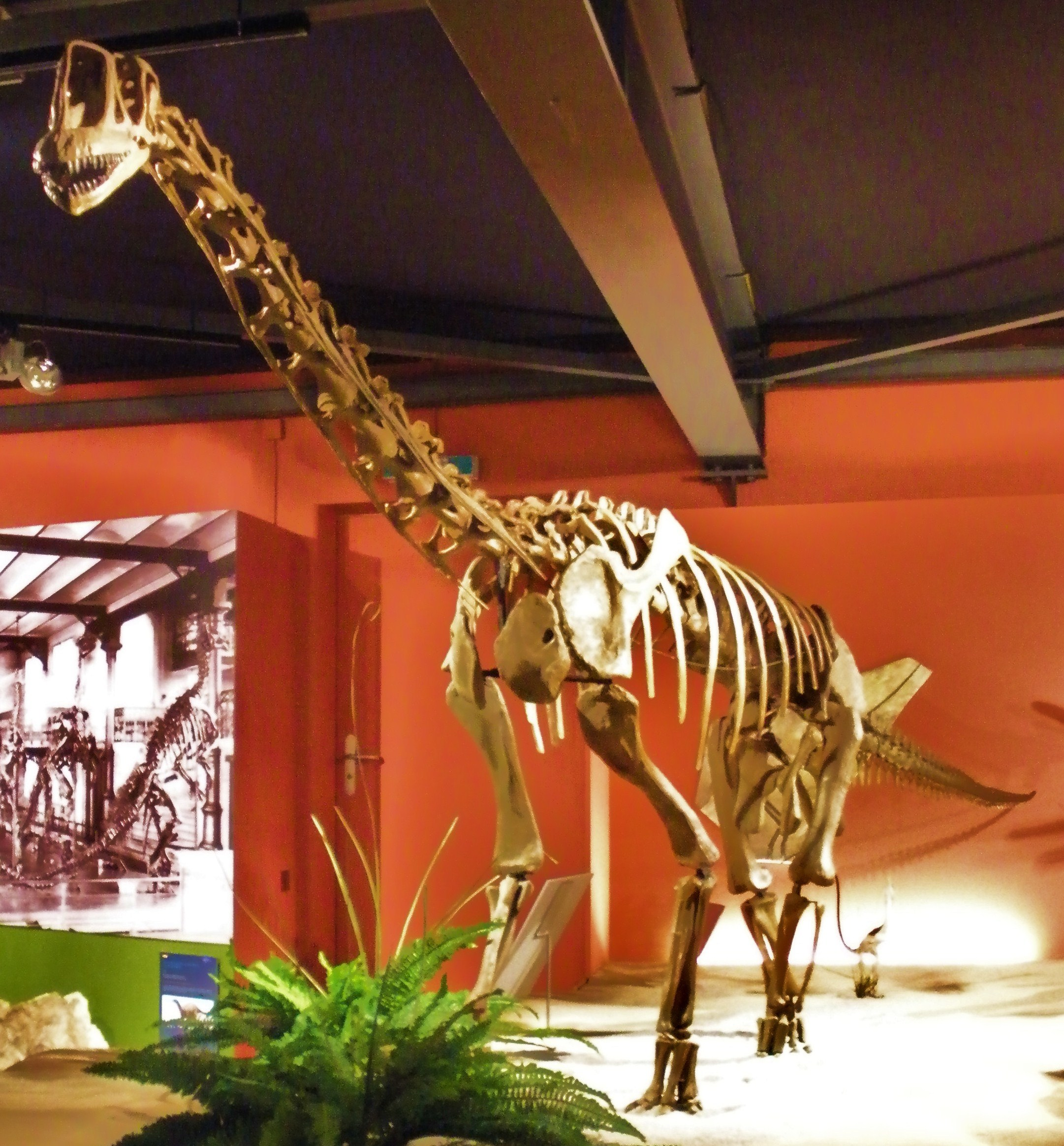 fossil Europasaurus, Aathal Dinosaur Museum.